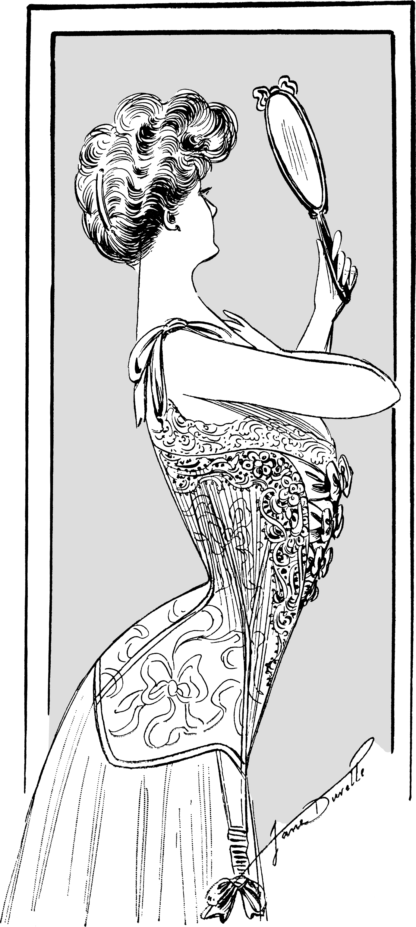 Cet autre corset (fig. 103), a été créé avec le même souci de laisser la respiration libre. Très ouvert de va nt le corset est pris par le buse, seulement un peu au­dessus de la taille. De là à la gorge, les bords se trou­vent reliés par des élastiques recouverts de rubans se nouant au milieu, les nœuds de ruban sont plus petits, à mesure qu'ils se rapprochent de la taille. Le corset est en satin broché crême; tout autour du bord supé­rieur et le long des devants est posée une riche incrus­tatioIl de Venise à gros reliefs. La coupe nécessite une mention spéciale; nous avons seulement trois pièces, l'une faisant le devant vient très en dessous du bras, elle est faite d'une partie très longue, à laquelle est rat­taché, le long du buse, un morceau droit fil; la deuxième pièce devient la pièce de hanche et la troisième forme le dos. Nous insistons à dessein sur la disposition de ce corset ouvert devant, c'est un modèle tout nouveau, et appelé à rendre de grands services à toutes celles qui ne peuvent supporter aucune gêne, ou qui aiment être bien à l'aise.